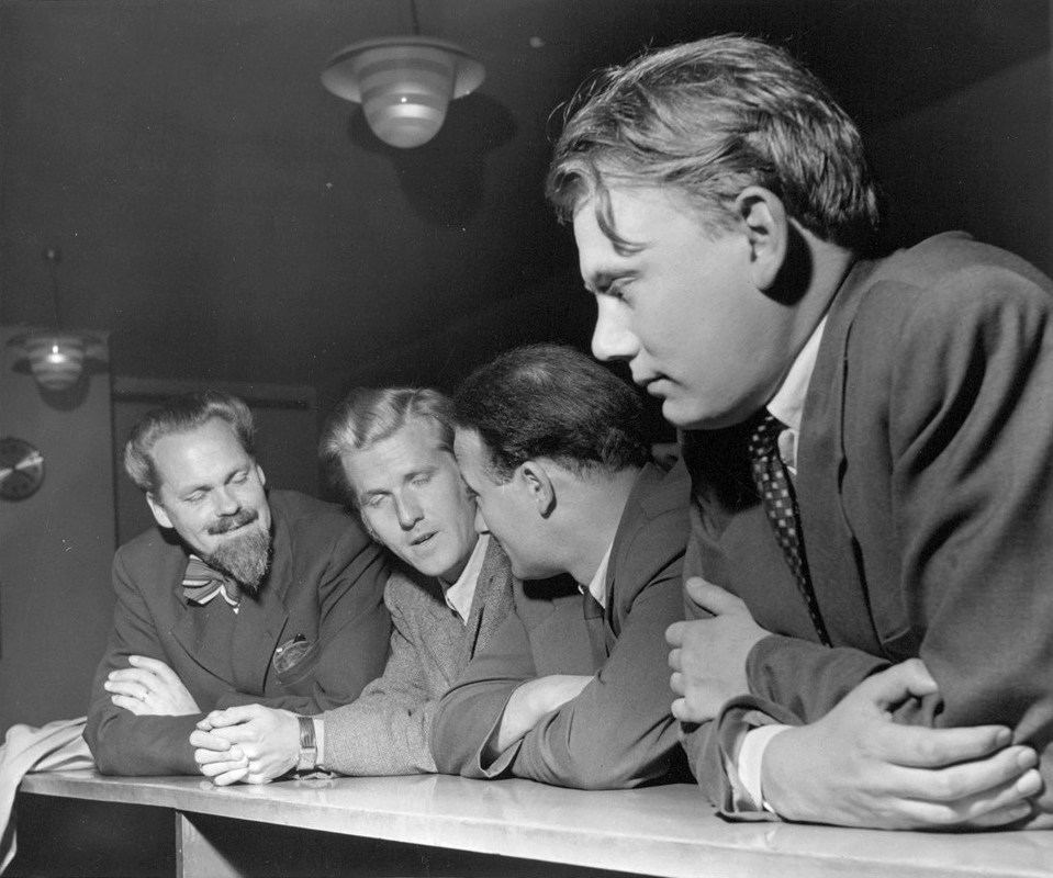 Det sades hårda ord om svenska teaterchefer och teaterkanslier vid den diskussion som Arbetslaget för svensk scenkonst hade anordnat i Stockholm i lördags. Flera författare påstod att teatrarna är helt ointresserade av nya svenska pjäser. Dessutom bör författarna ska släppas in på scenerna under repetitioner, så att de lär sig, hur en pjäs ska skrivas rent tekniskt. Bilden visar Gunnar A. Bergman, Lennart Wiechel, Josef Halfen och Lars Forssell i diskussionstagen.